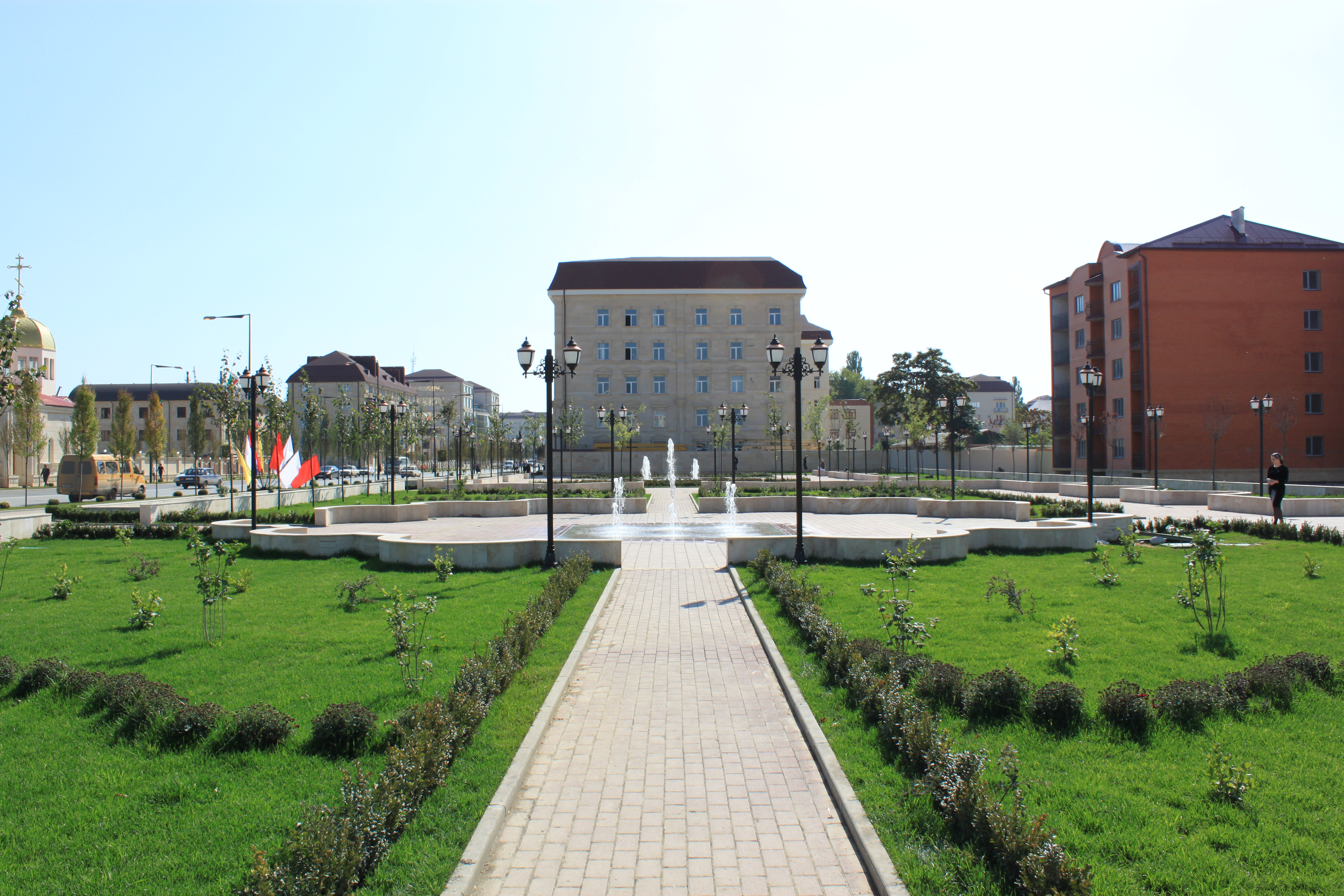 Грозный